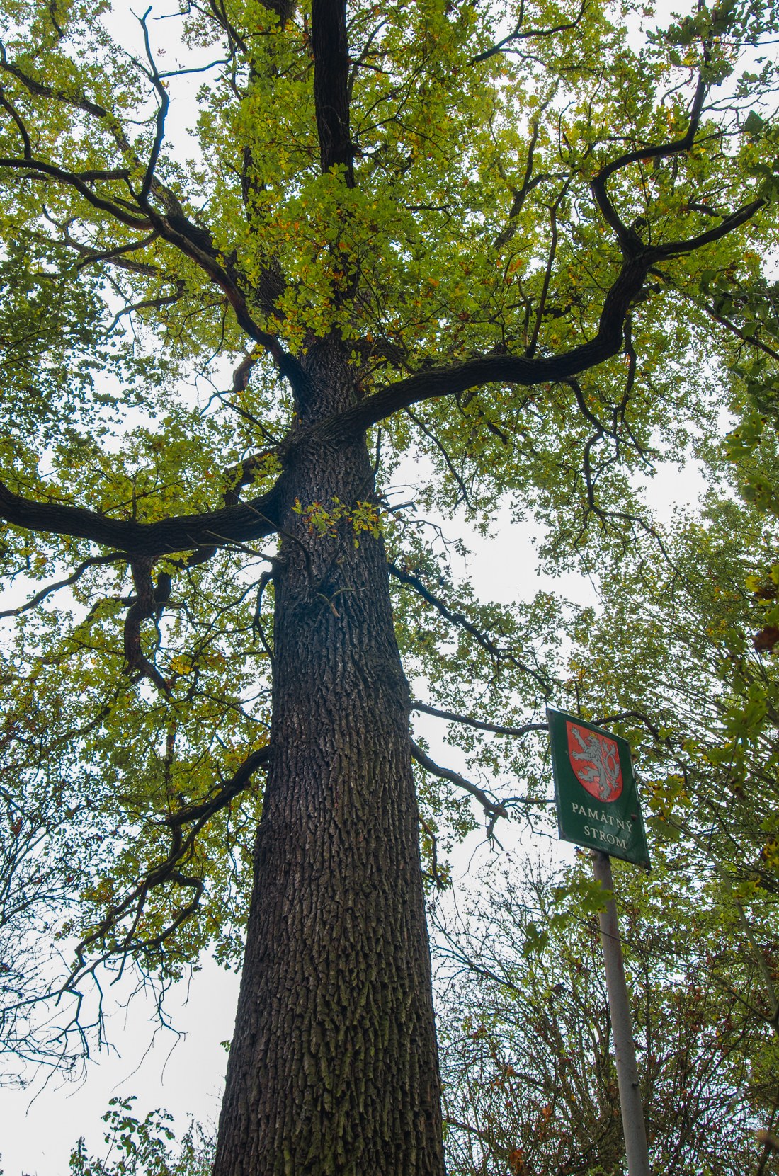 památné stromy - Valdovské duby, okres Cheb